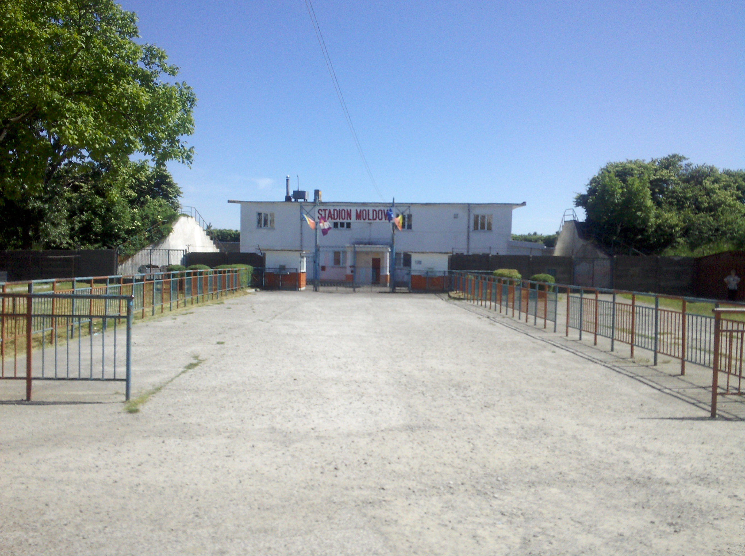 estadio de futbol Moldova en Roman